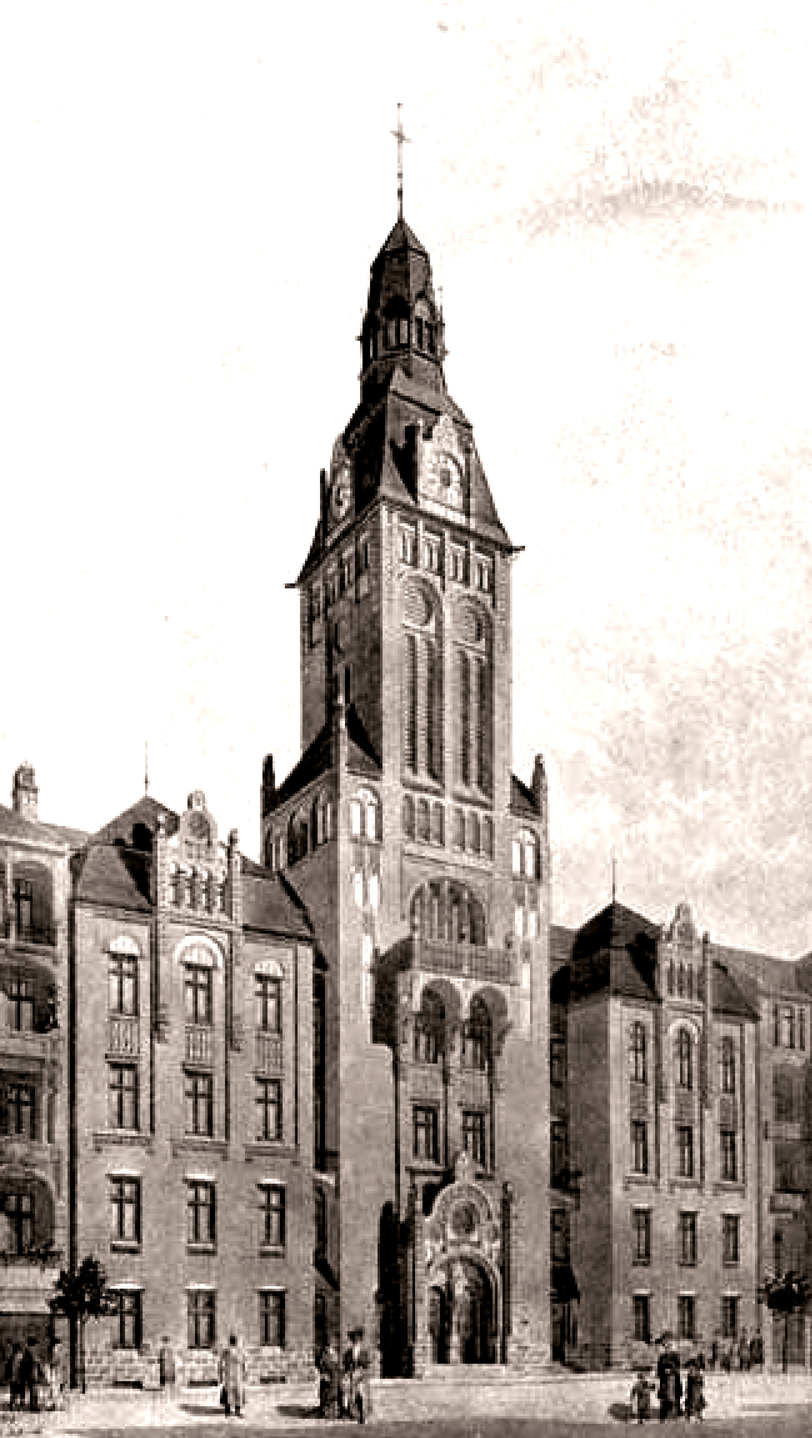 eingescannter Entwurf der 1908-1909 erbauten Martin-Luther-Kirche in Berlin-Neukölln, Fuldastraße 50